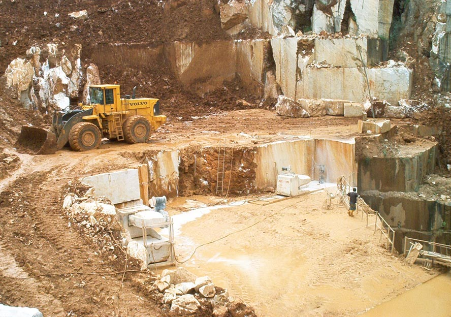 Abbau des berühmten Carrara Marmor